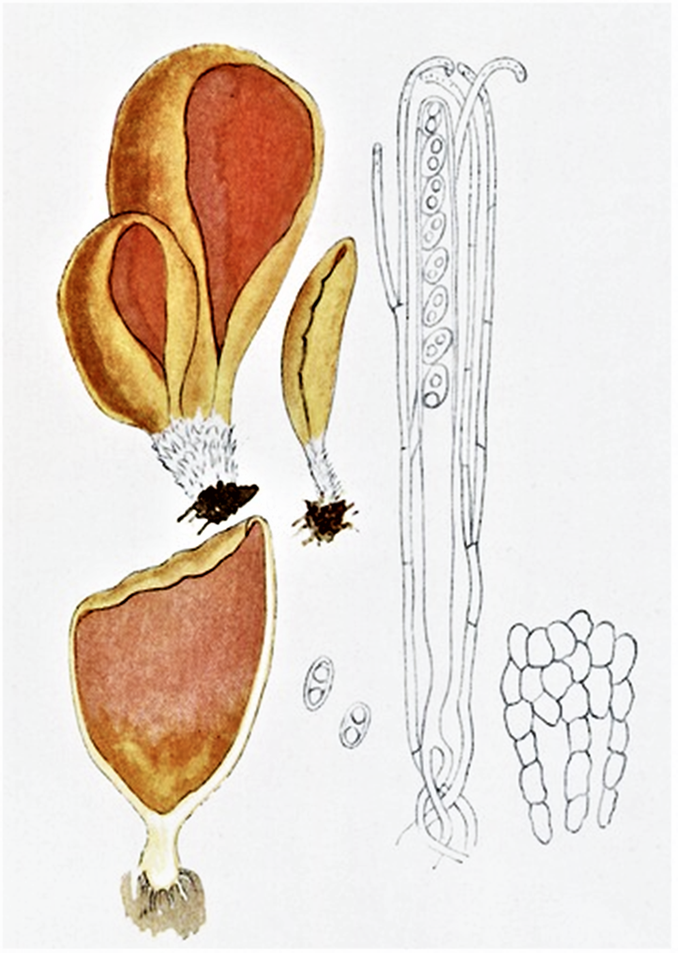 Giacomo Bresadola: Otidea onotica (Pers.) Fuckel (1870)